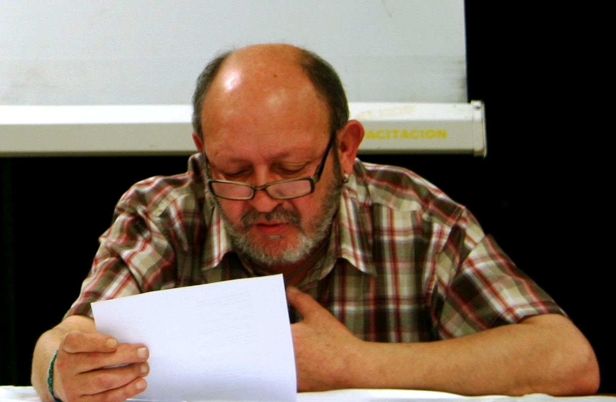 Julio José Leite (Río Grande, Tierra del Fuego, 2014)